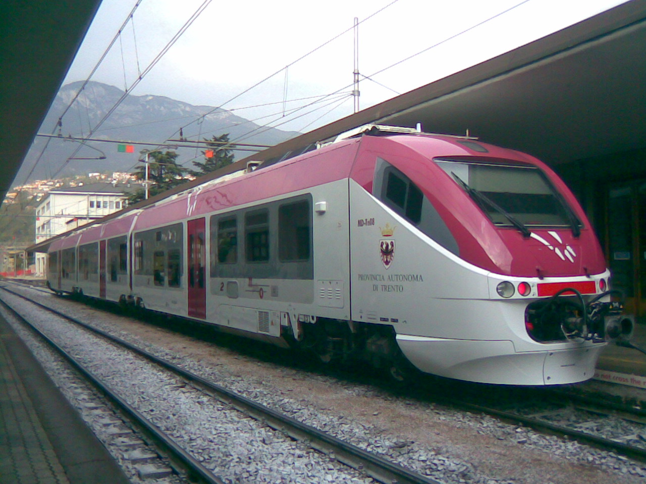 Minuetto Diesel della Trentino Trasporti